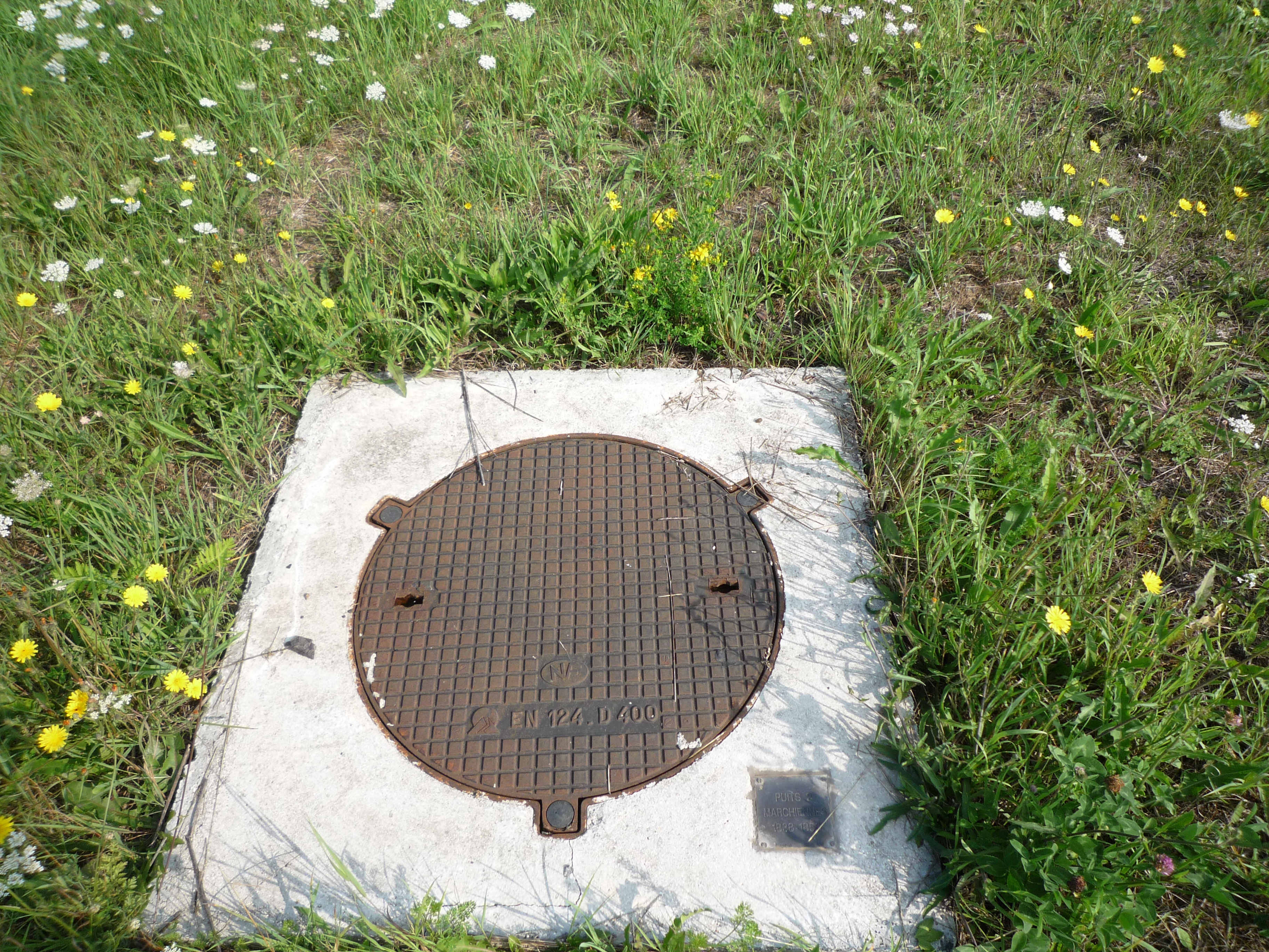 La Seconde Fosse de Marchiennes de la Compagnie des Canonniers était un charbonnage constitué d'un seul puits situé à Marchiennes, Nord, Nord-Pas-de-Calais, France.